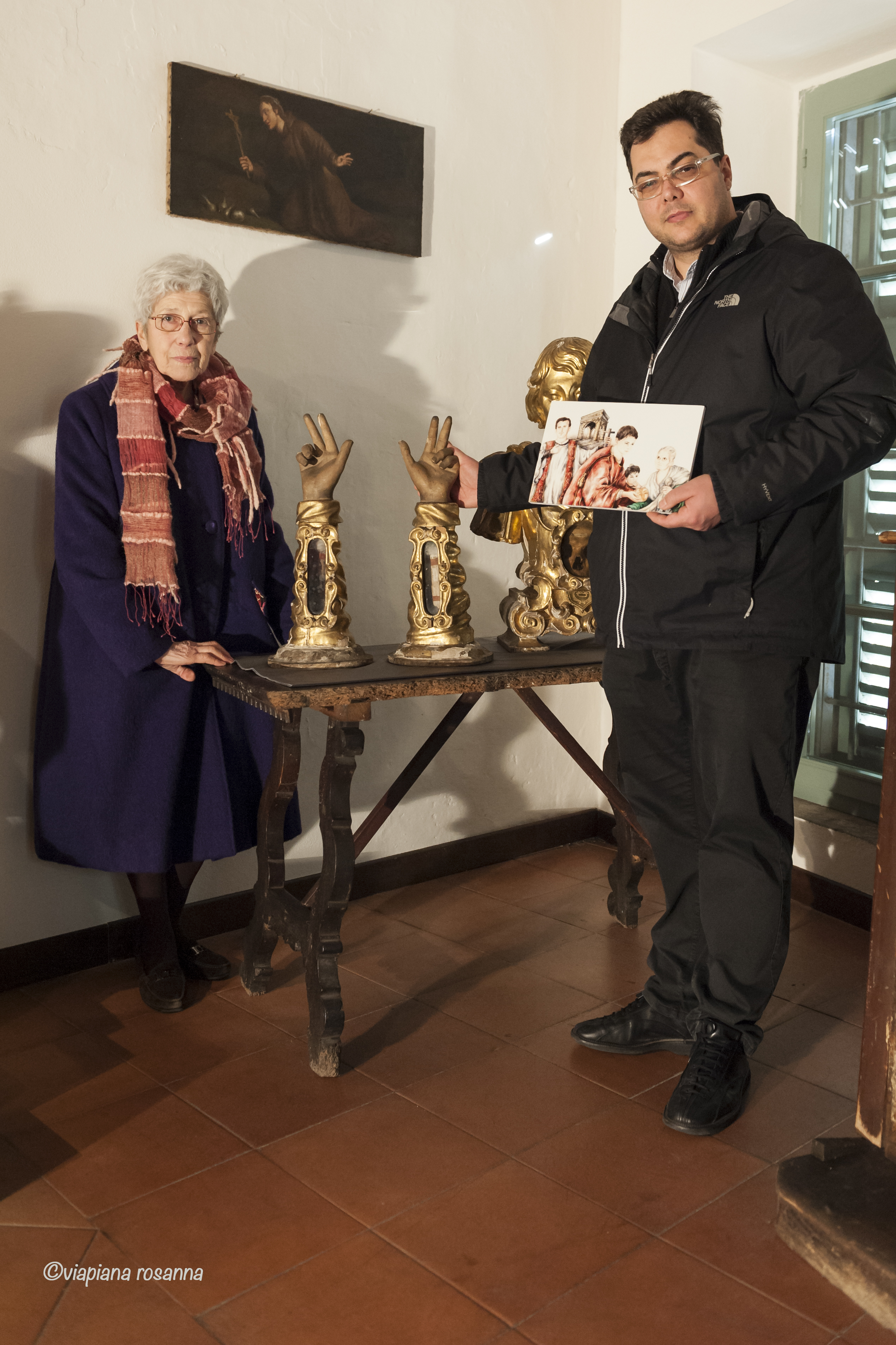 Museo Parrocchiale "G.B. Tosio" di Asola: la Prof. Matilde Monteverdi, curatrice del museo, e Don Daniele Stanghellini espongono l'illustrazione "Predicazione di Cesario e Giuliano" accanto ai reliquiari dei SS. Cesario e Giuliano.